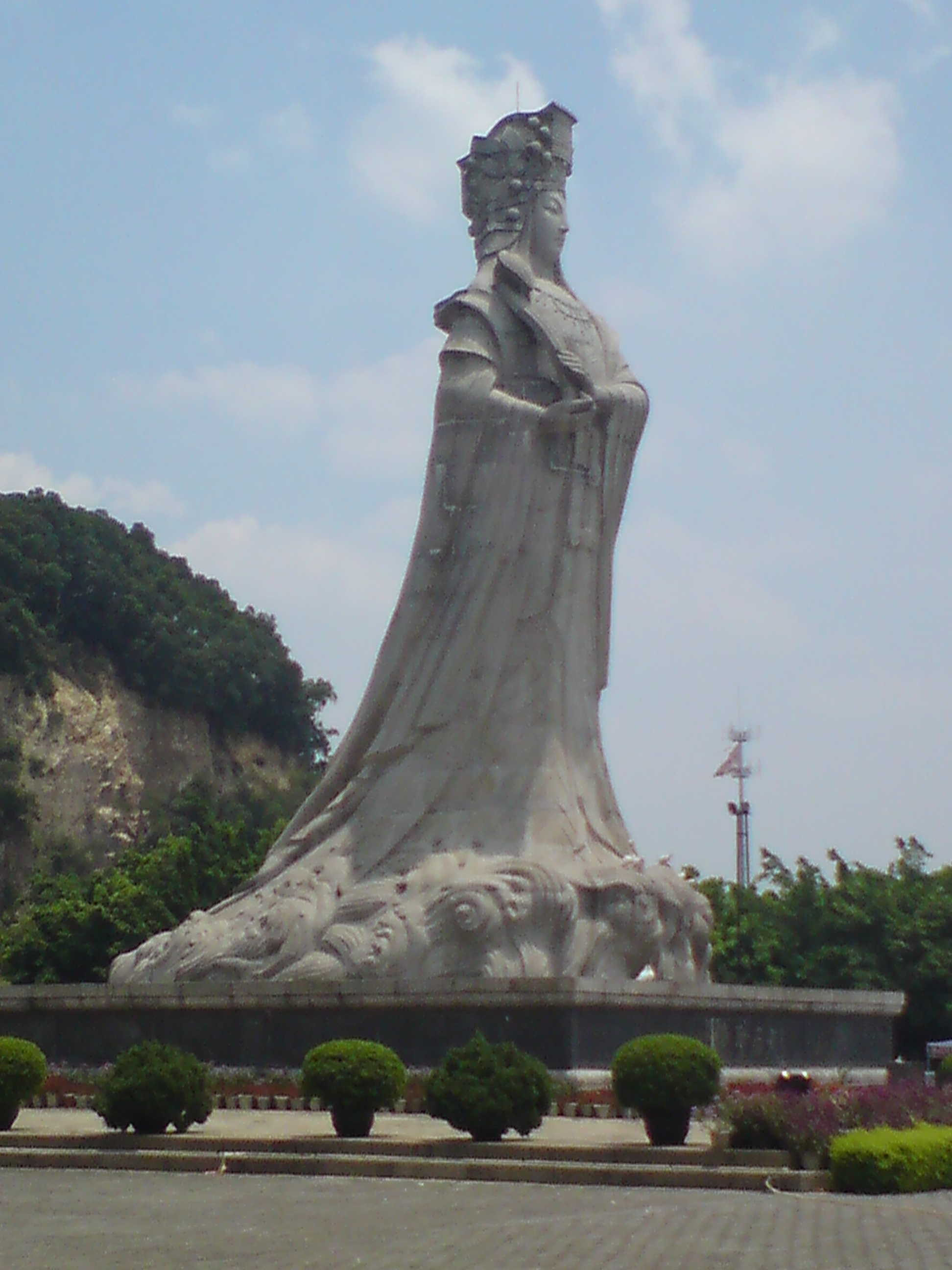 南沙天后宫